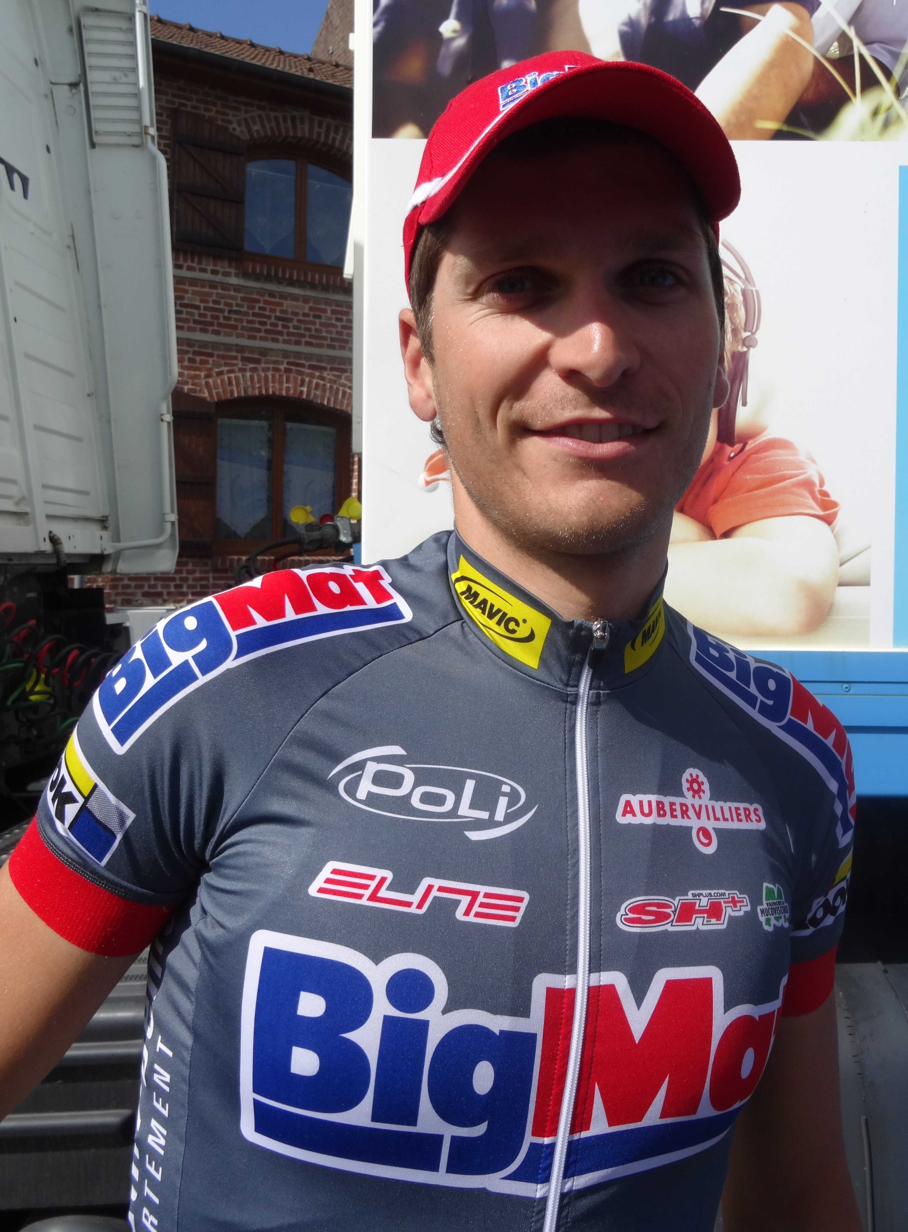 Reportage photographique réalisé le vendredi 23 mai 2014 à l'occasion du départ de la première étape du Paris-Arras Tour 2014 à Lens, Pas-de-Calais, Nord-Pas-de-Calais, France. Depicted person: Frédéric Brun